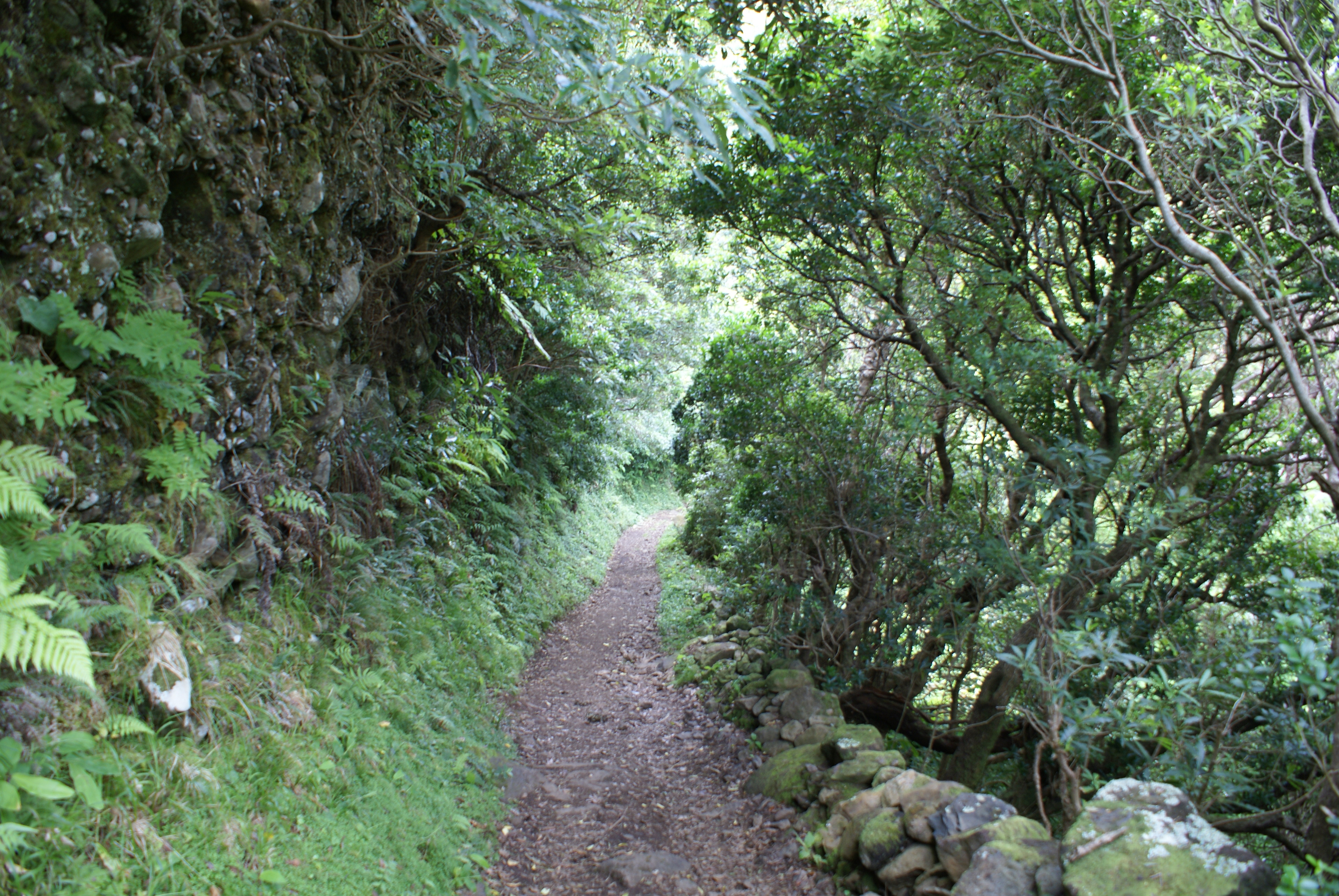 Caminho pedestre da Serra do Topo para a Fajã de Santo Cristo, caminho, Calheta, ilha de São Jorge, Açores